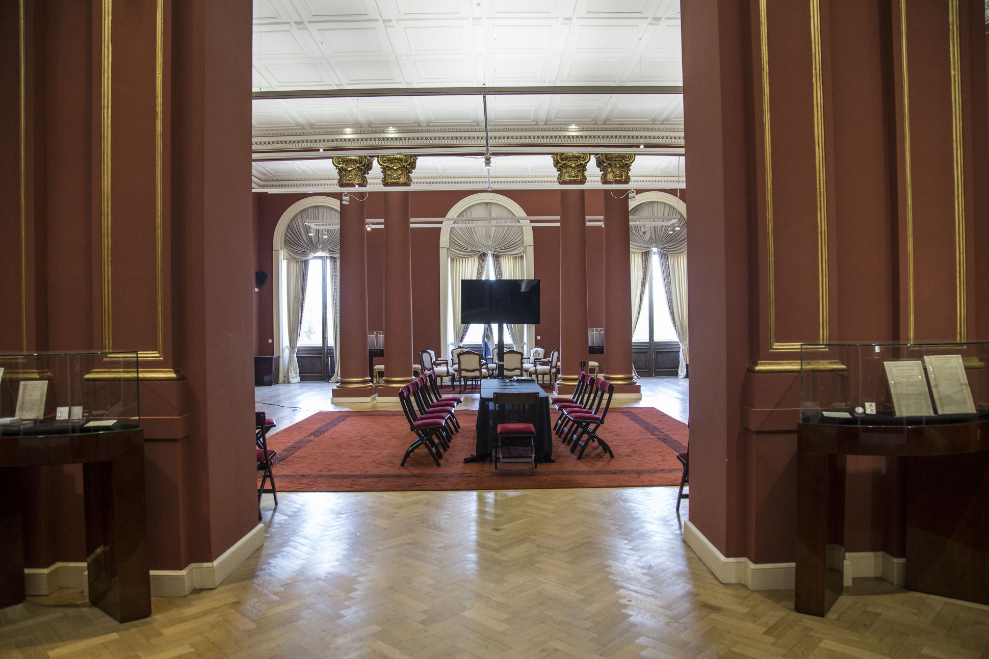 Salón de los Pueblos Originarios, Casa Rosada.